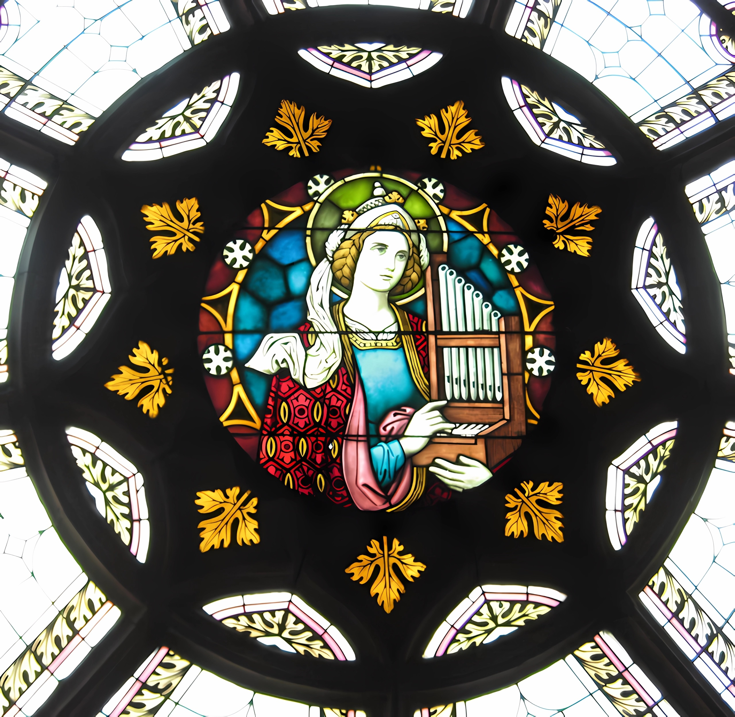 Zentralmotiv der Hl .Cäcilia